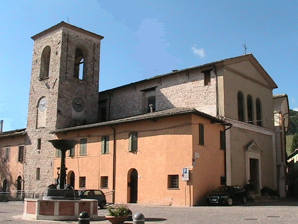 Muccia - chiesa parrocchiale